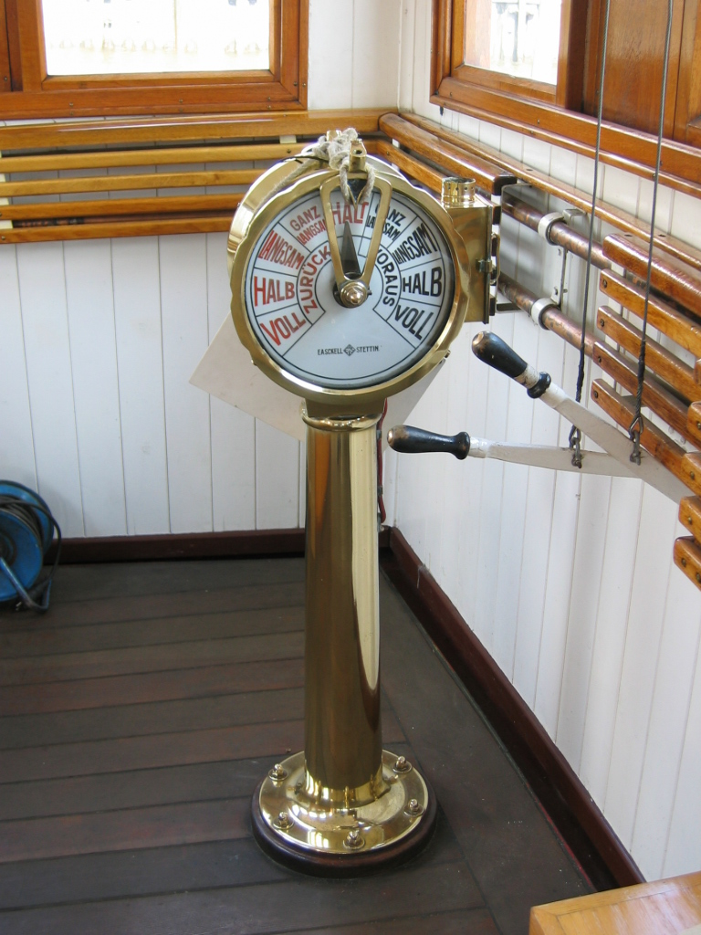 Telegraf maszynowy na parowcu (lodołamaczu) Stettin - mostek.